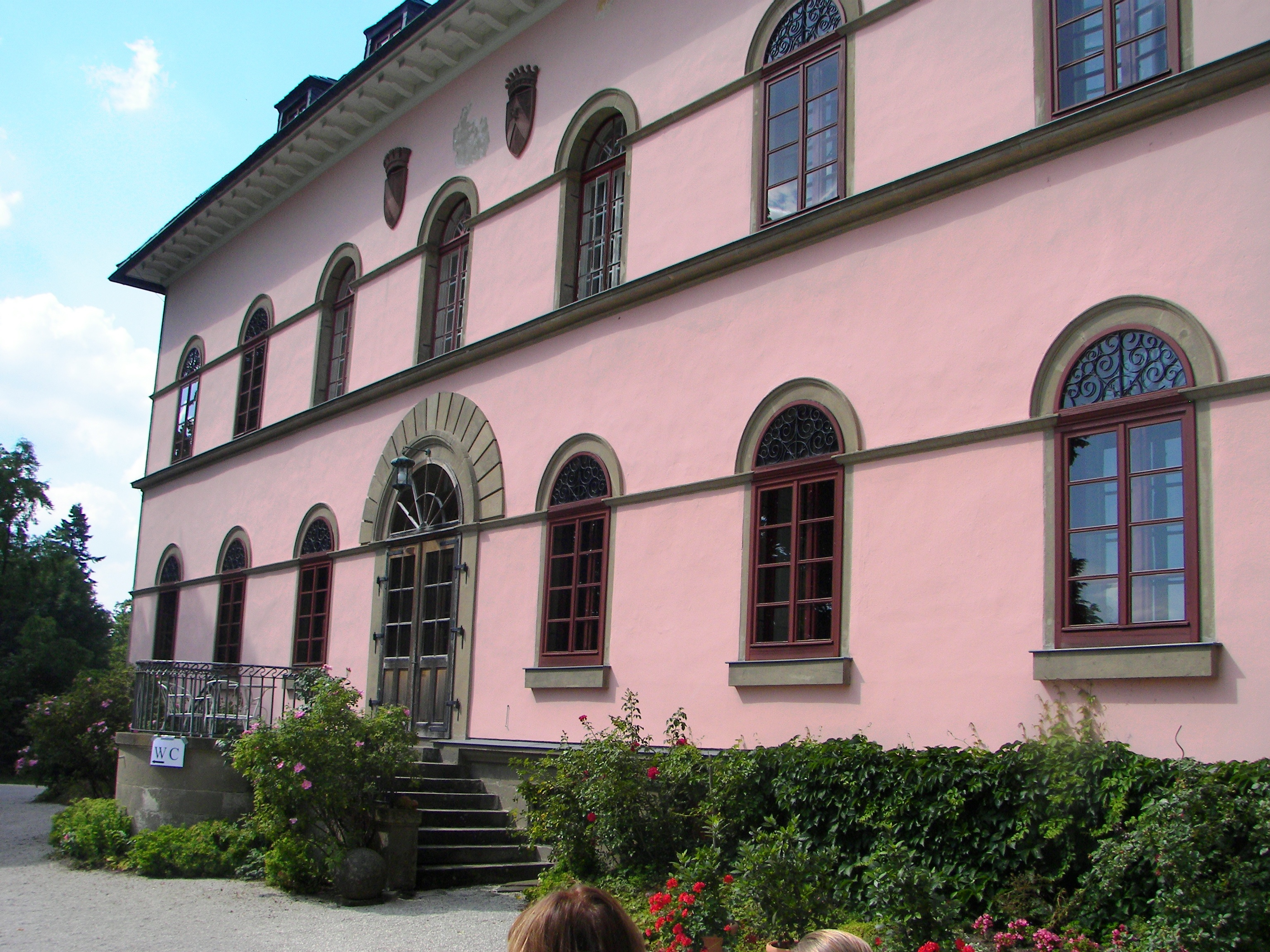 Ministerhaus neben dem Schloss in Heinersreuth, Gemeinde Presseck, Besitzer: von Lerchenfeld